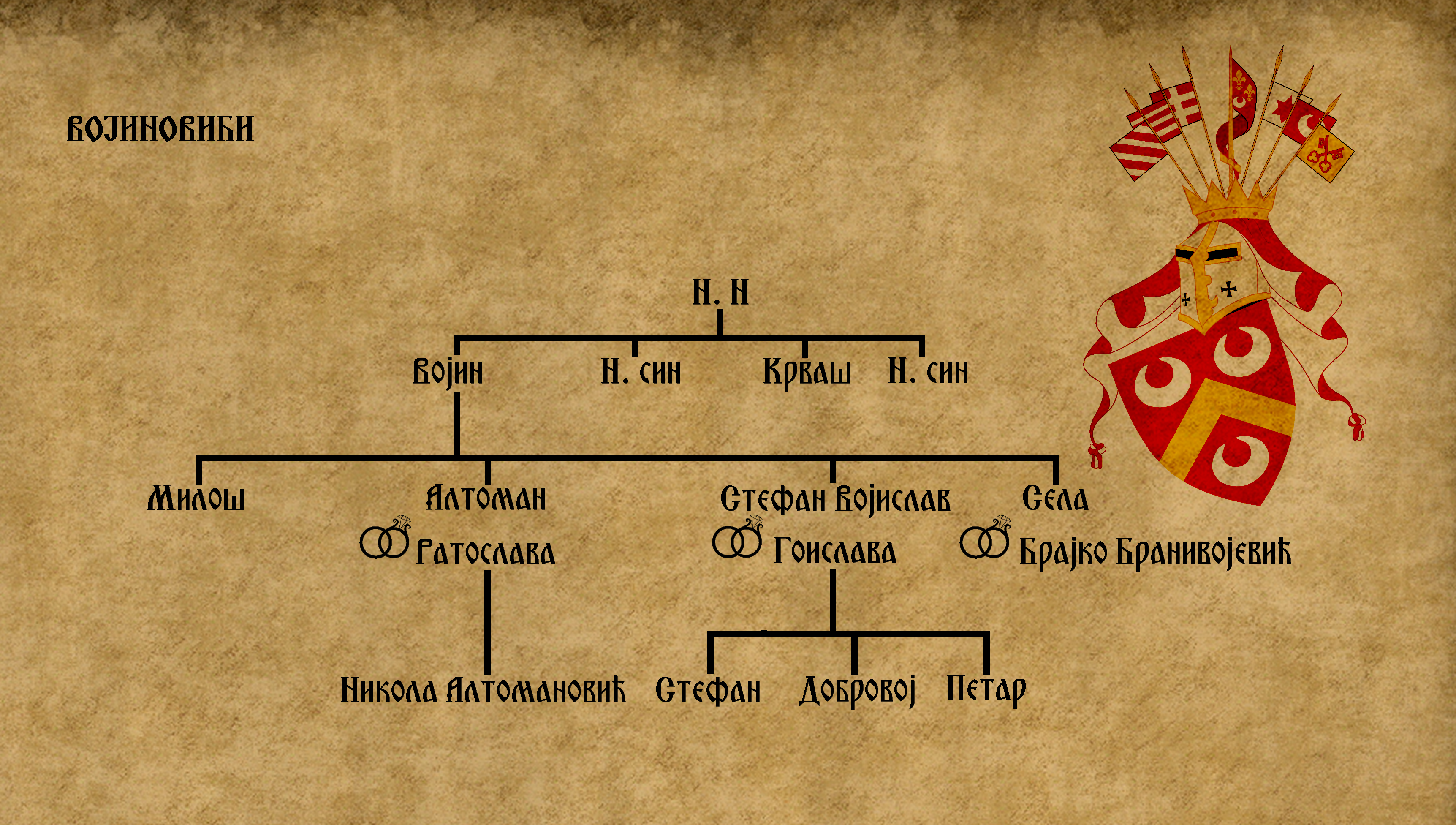 Родослов Војиновића. Рађен према